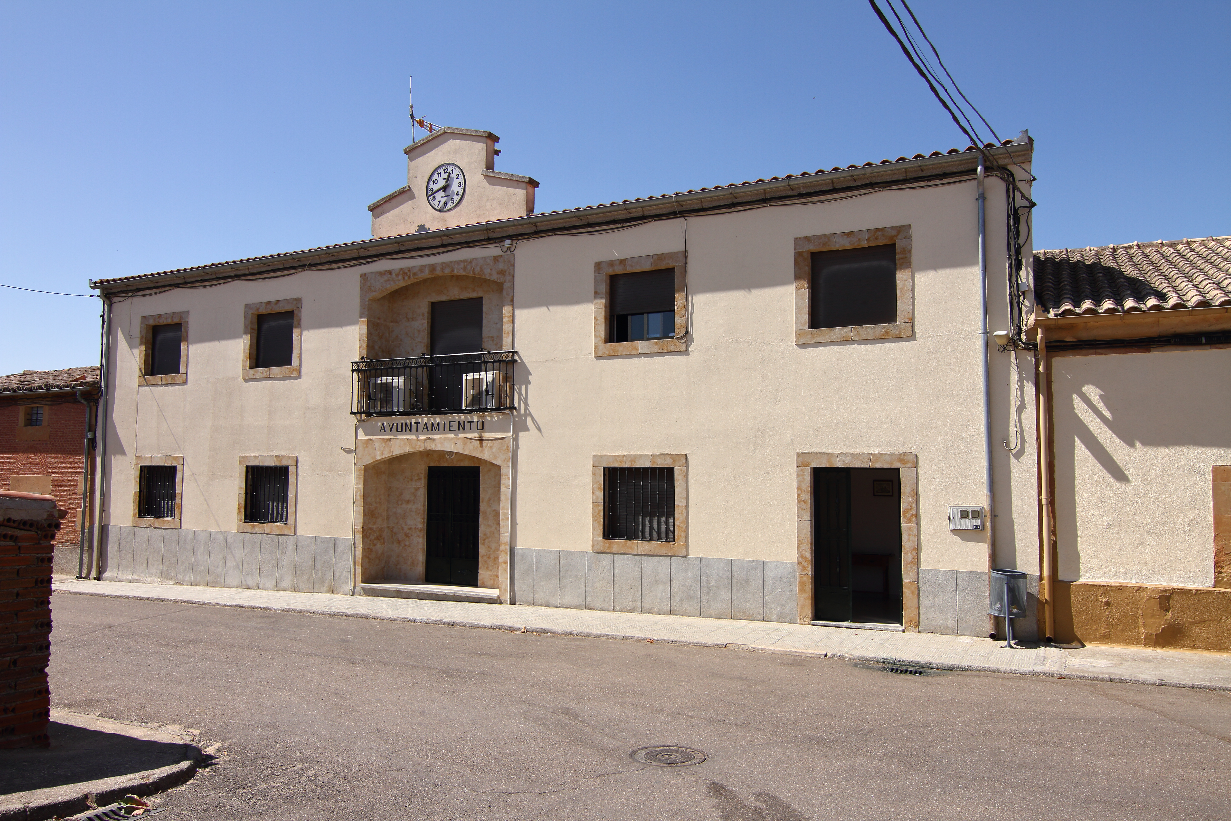 Ayuntamiento de Cordovilla